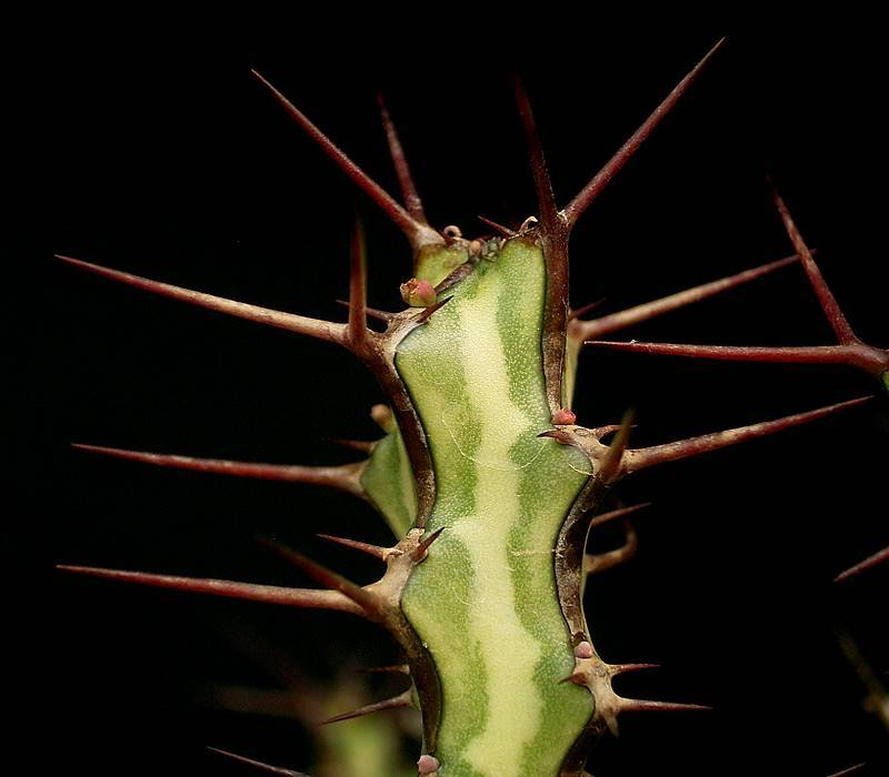 Euphorbia odontophora